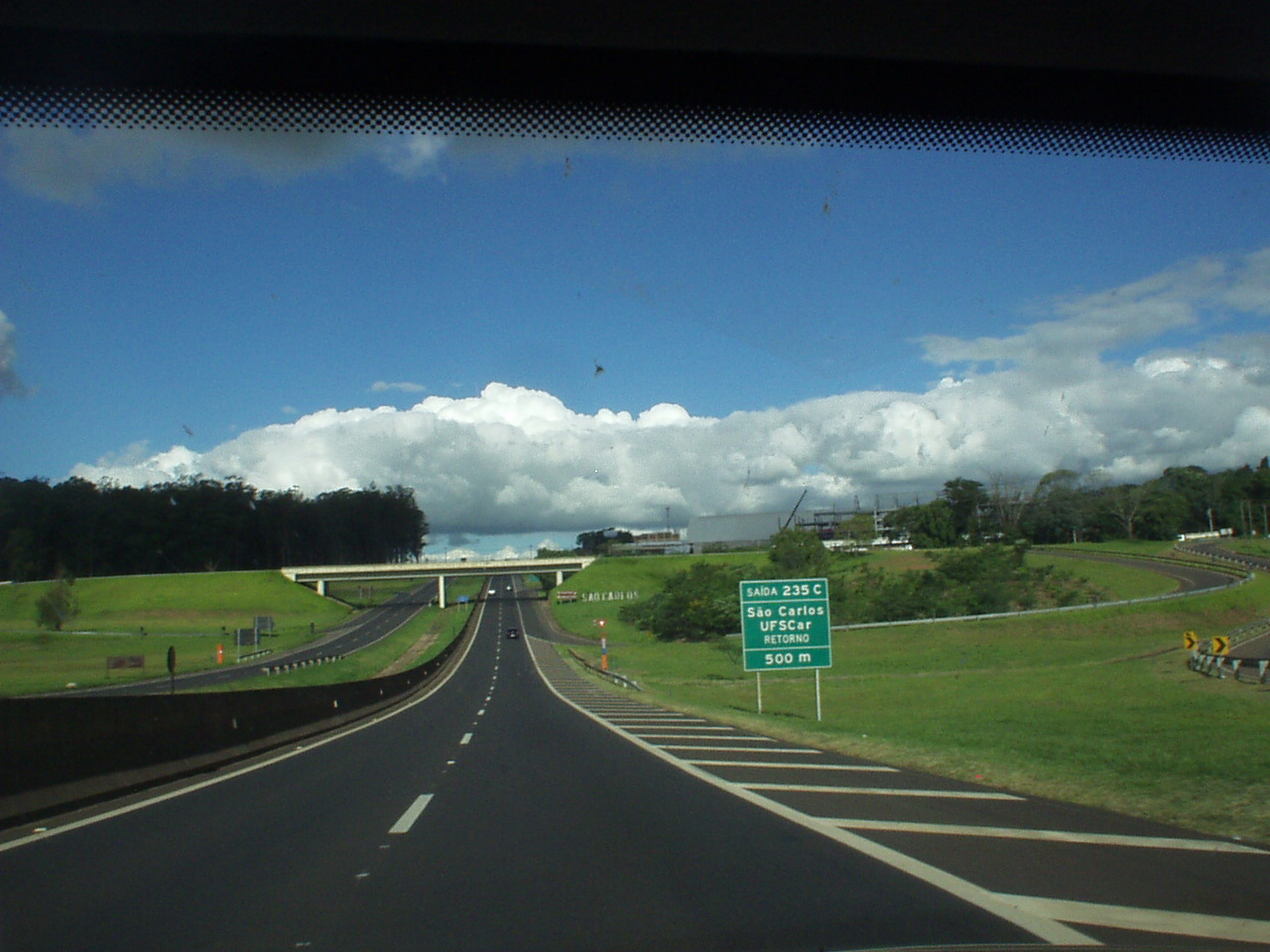 SP 310- Rod. Washington Luiz - sentido interior/São Carlos